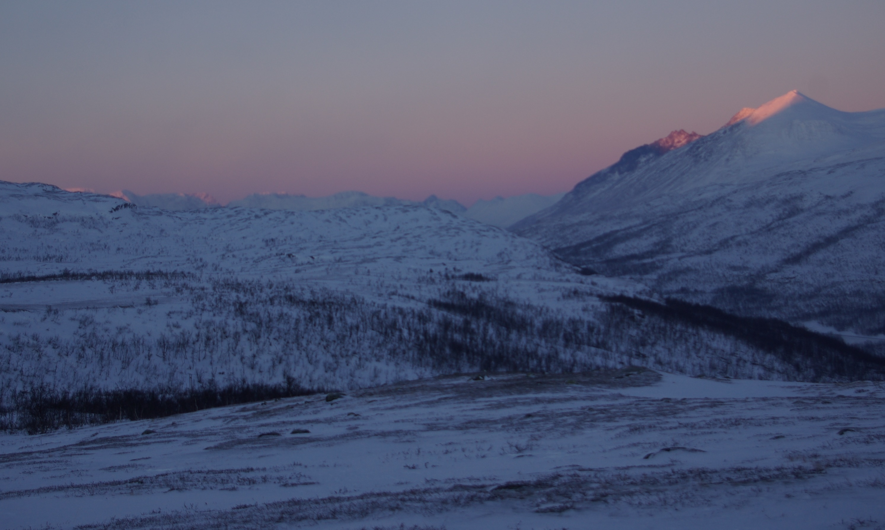 Skibotndalen i Storfjord kommune i Troms. Bilde tatt den 15.01.15